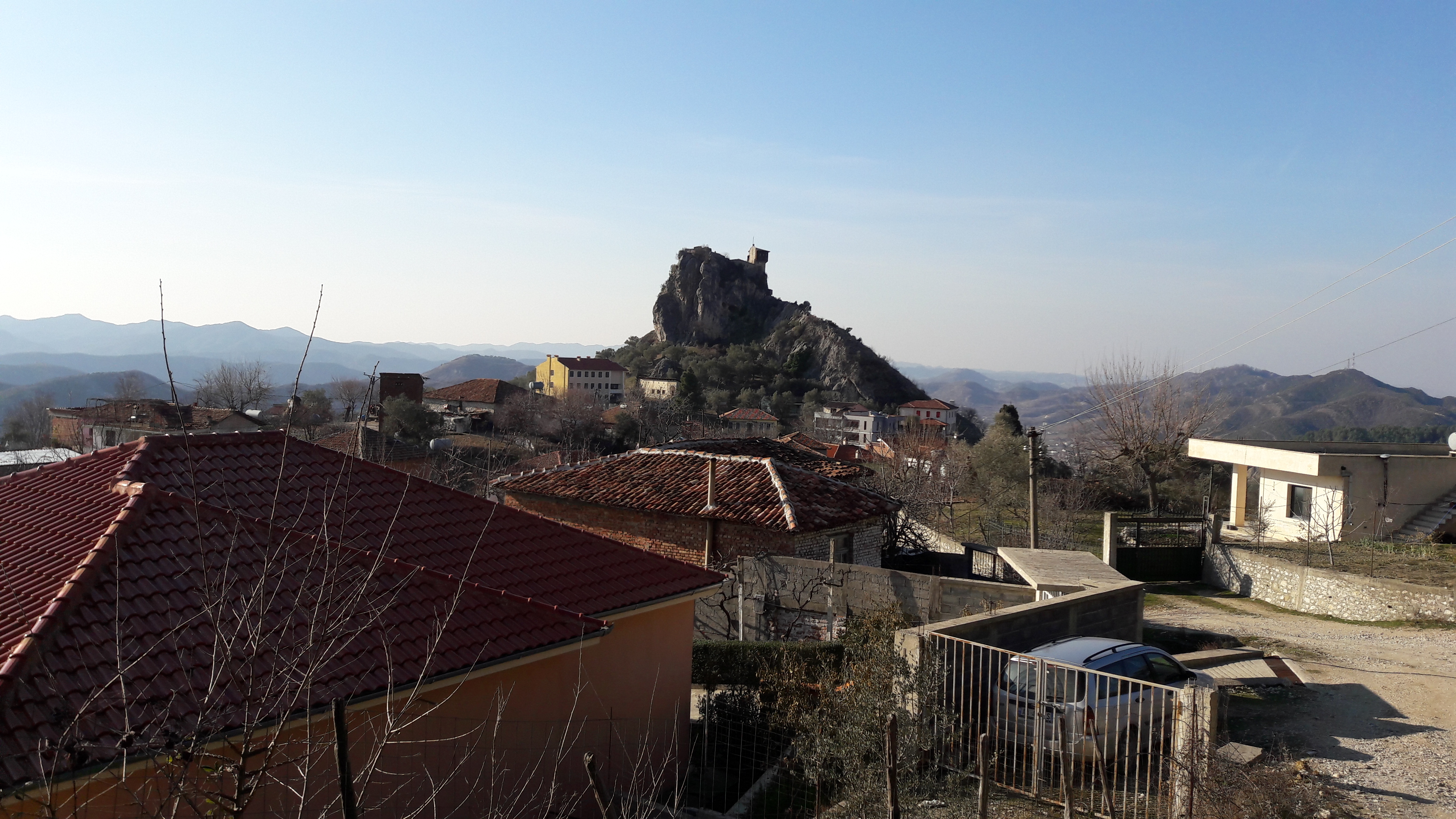 Kështjella e Petrelës